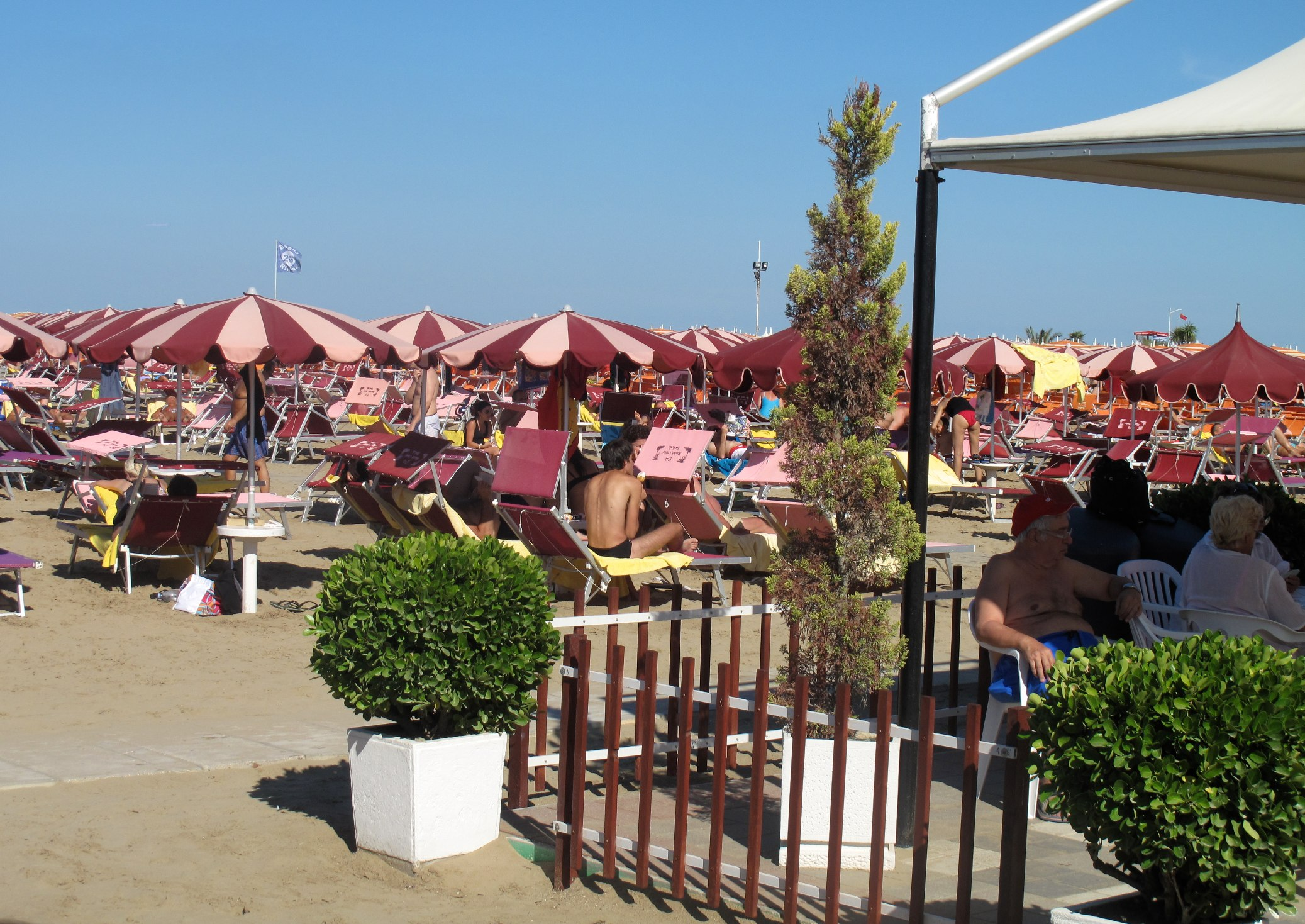 visite plages de Rimini en juillet 2010